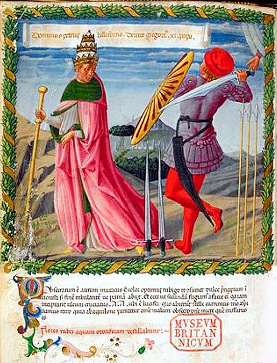 Grégoire XI Museum Britanicum